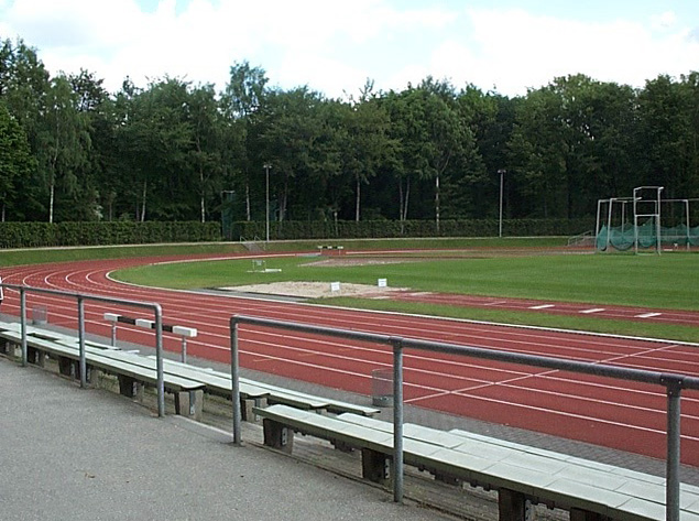 Sportplatz mit Leichtathletik-Anlagen (Jahnkampfbahn im Hamburger Stadtpark)